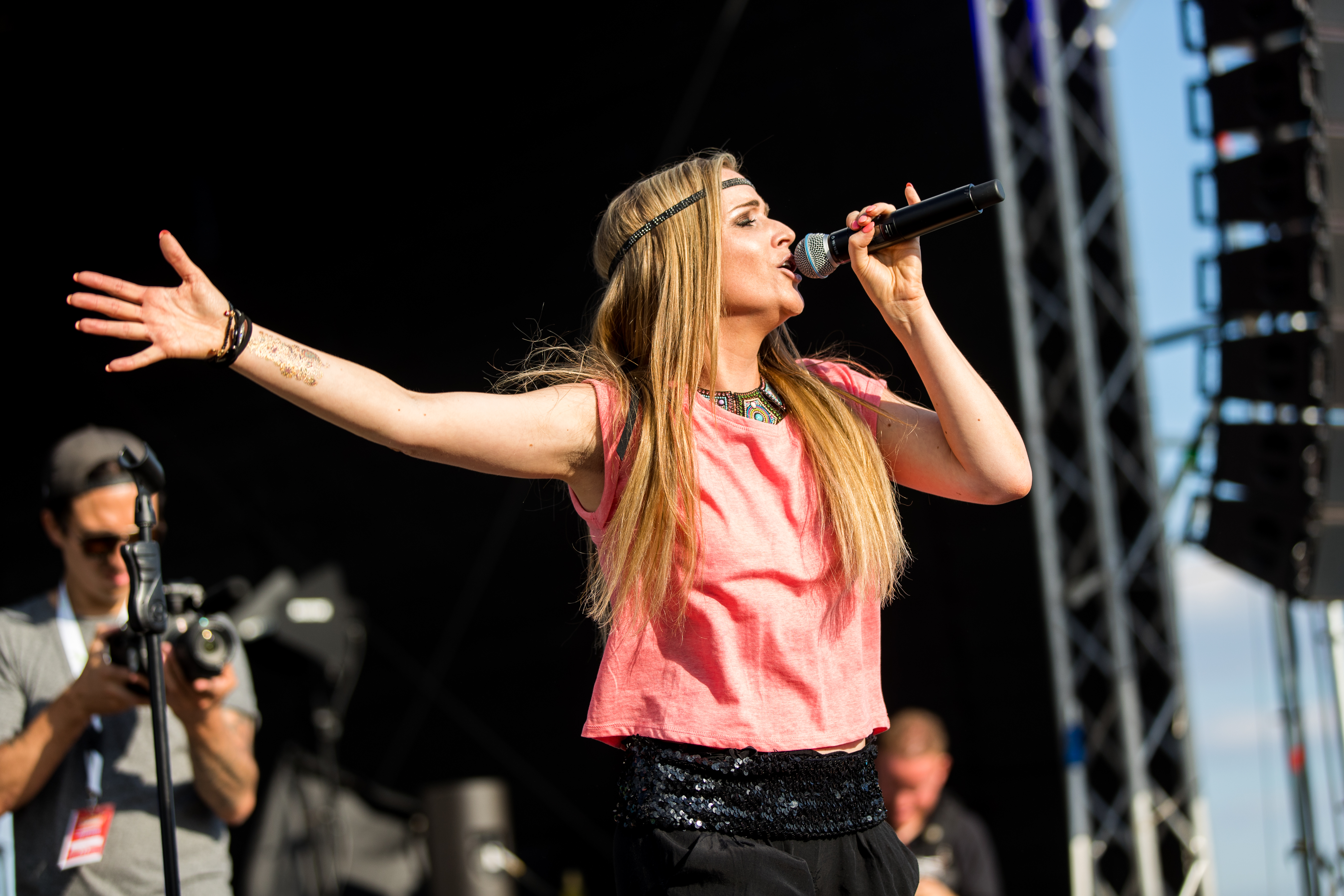 Marry during La Ola Mannheim at Maimarktgelände, Mannheim, Baden Württemberg, Germany on 2016-07-09, Photo: Sven Mandel